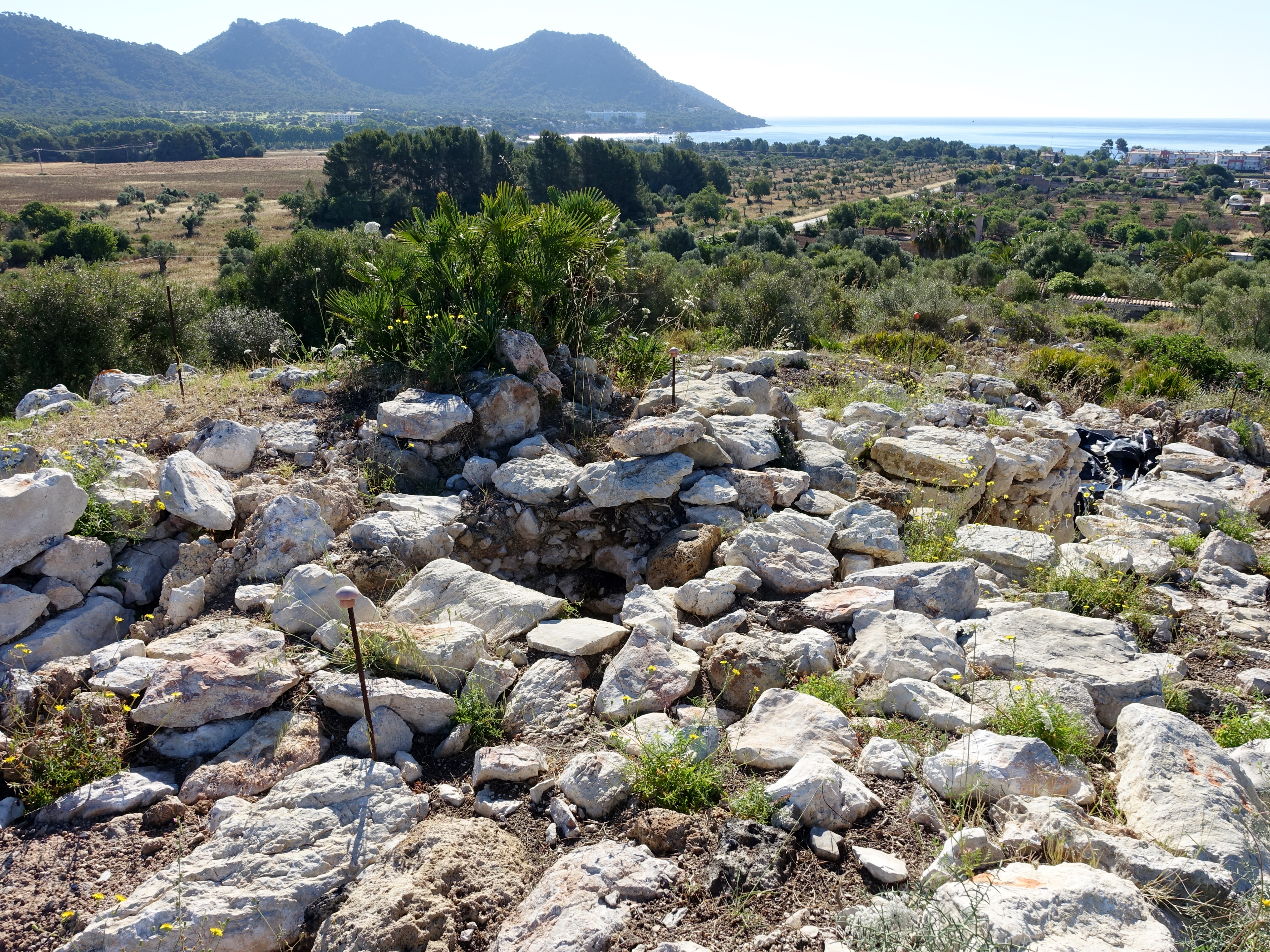 Ausgrabungsstätte Mestre Ramon, Gemeinde Son Servera, Mallorca, Spanien